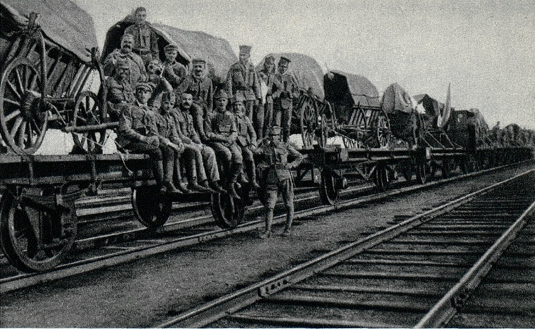 Wyjazd legionistów na front.